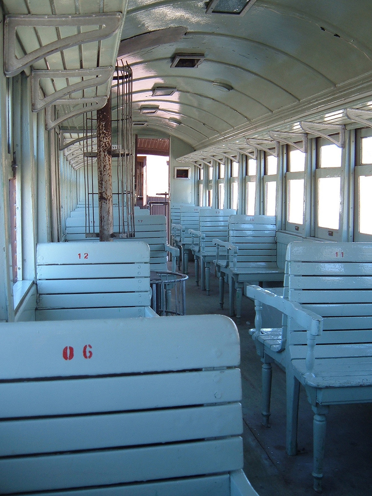 Interior de un vagón de La Trochita en Esquel, provincia del Chubut. Se observa el sistema de calefacción a leña.